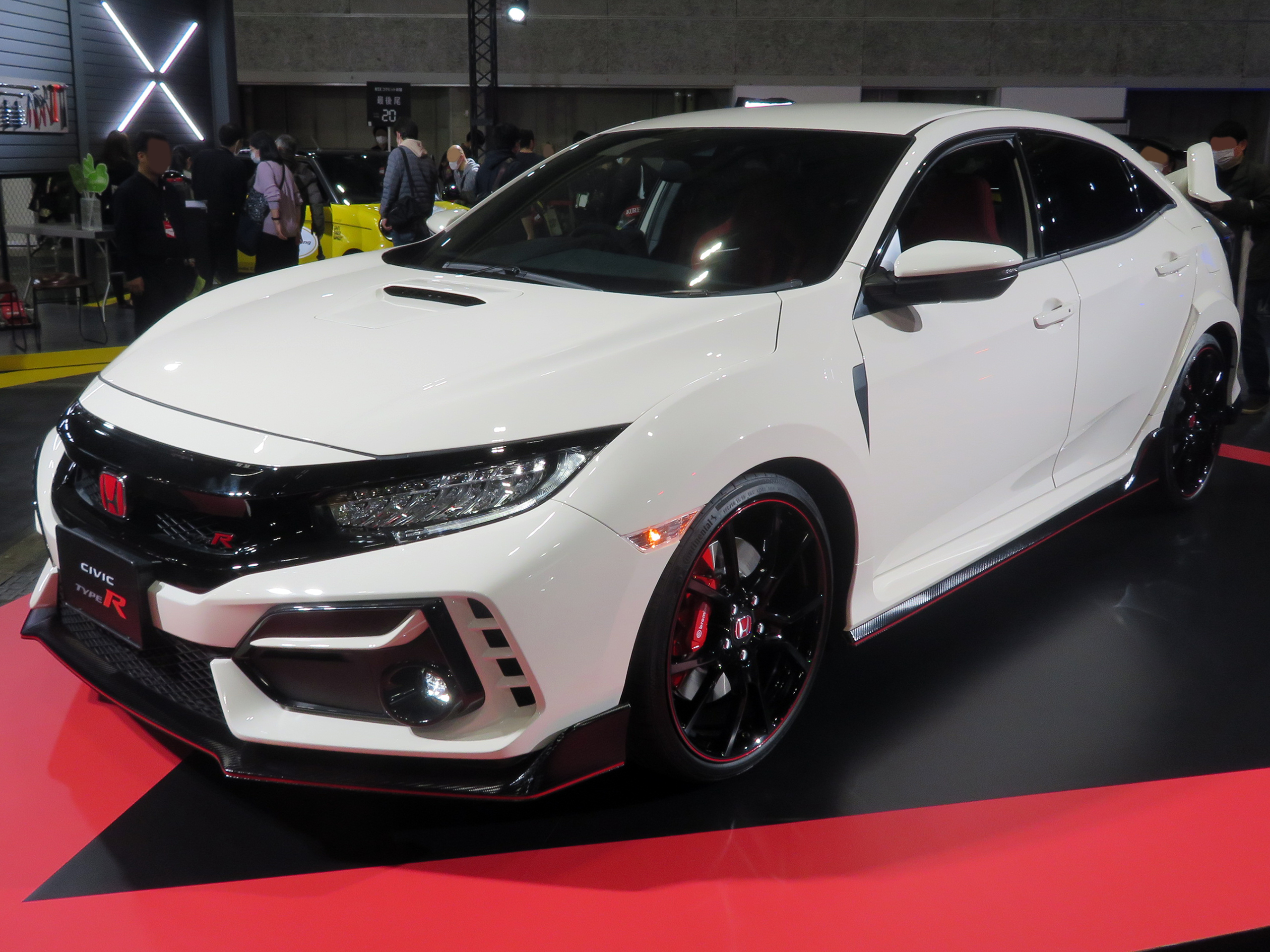 大阪オートメッセ2020に於いてホンダ・シビックタイプRの2020年仕様を撮影。